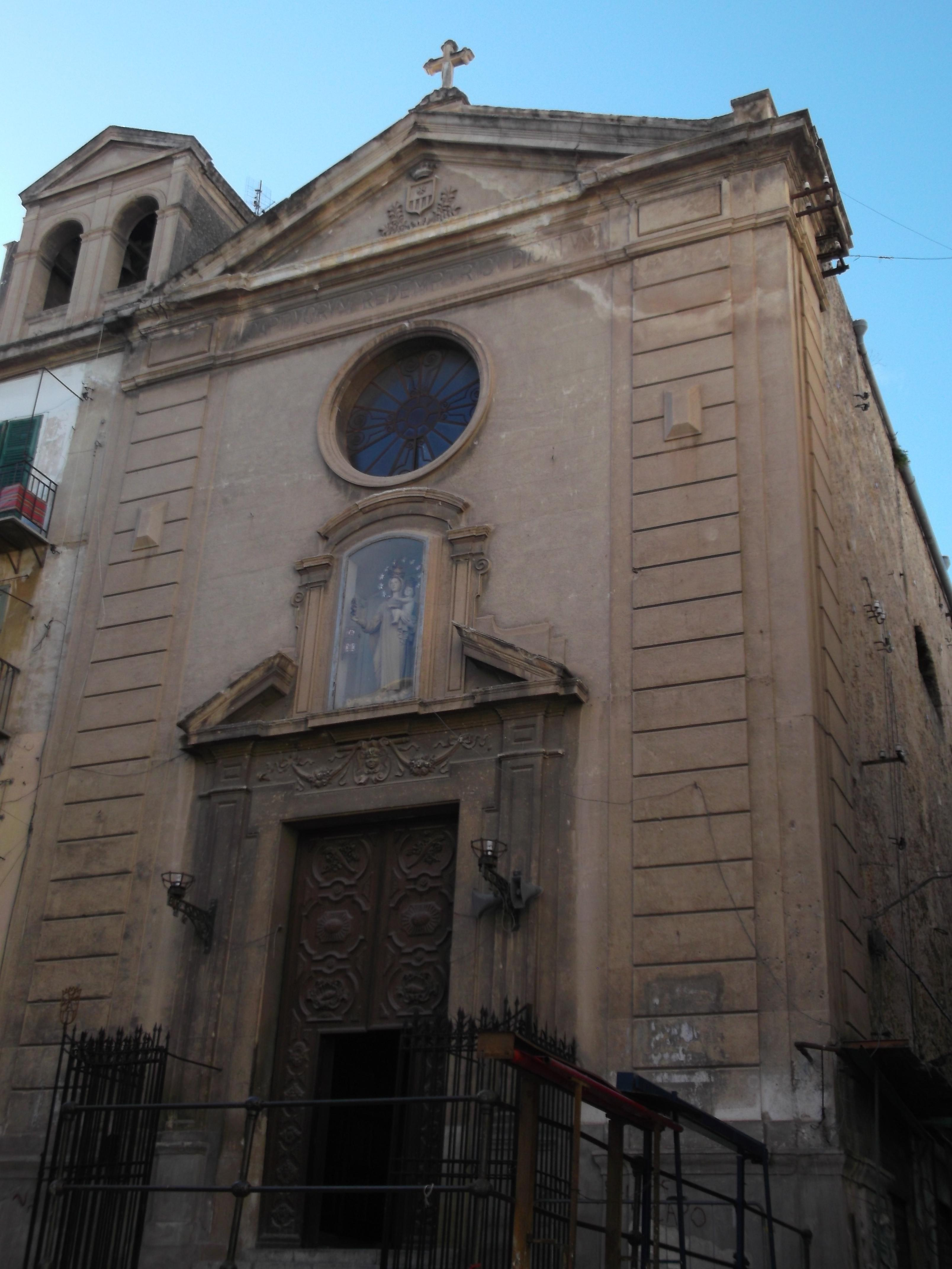 Facciata